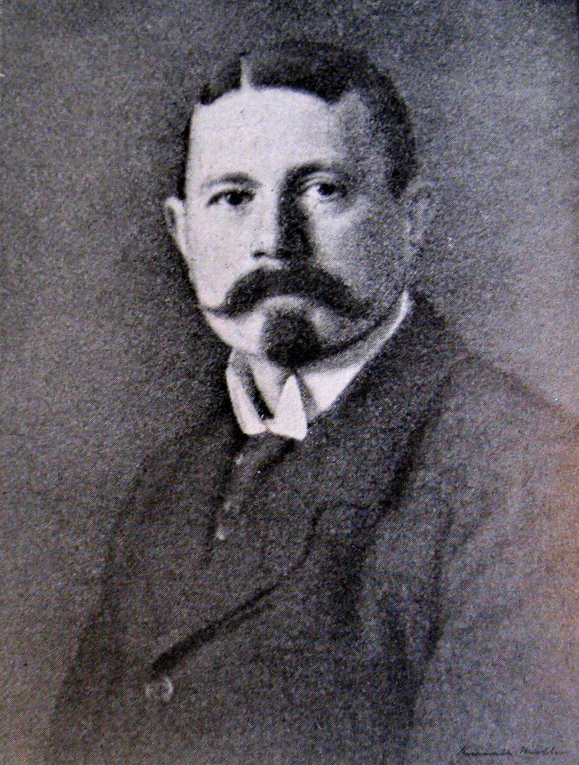 Palle Adam Vilhelm baron Rosenkrantz (22. april 1867 i Helsingør – 1. oktober 1941 i Charlottenlund) var en dansk baron, jurist, forfatter og oversætter